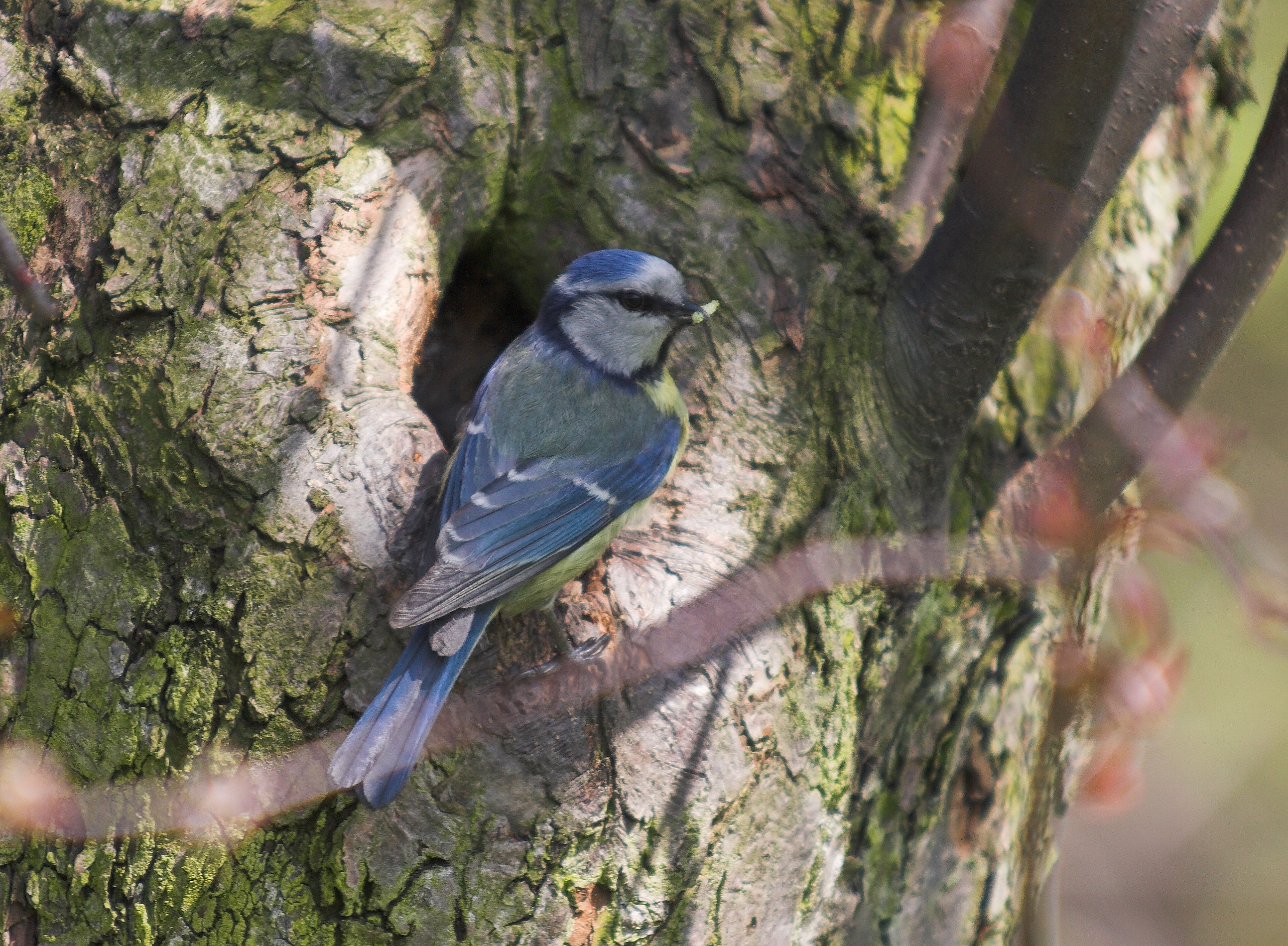 Sikora modra przy dziupli (modraszka, Parus caeruleus) . Polska, Chorzów, WPKiW